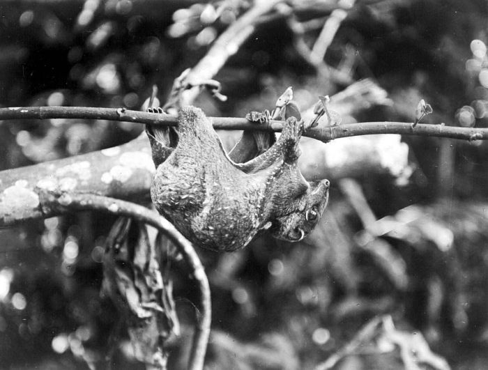 Repronegatief. De bioloog Dr. Felix Kopstein zag kans de toen al zelden waargenomen vliegende maki te fotograferen in een stuk oerwoud aan de zuidkust van Java dat gekapt werd (zie zijn Zoologische Tropenreise voor meer zeldzame en fraaie foto's). Toen Kopstein zijn foto's nam was er nog redelijk wat oerwoud te vinden in West en Oost-Java. Afgezien van enkele natuurreservaten is daar nu niet veel meer van over. De bekende Britse naturalist Alfred Russel Wallace beschreef dit dier al in zijn Malay Archipelago uit 1869. Overigens vliegen de vliegende maki's niet maar bewegen ze zich voort in glijvlucht. Bij de inheemse bevolking waren deze dieren niet bepaald geliefd. (P. Boomgaard, 2001). Een vliegende maki (galeopithecus volans) hangt aan een tak, Zuid-Java